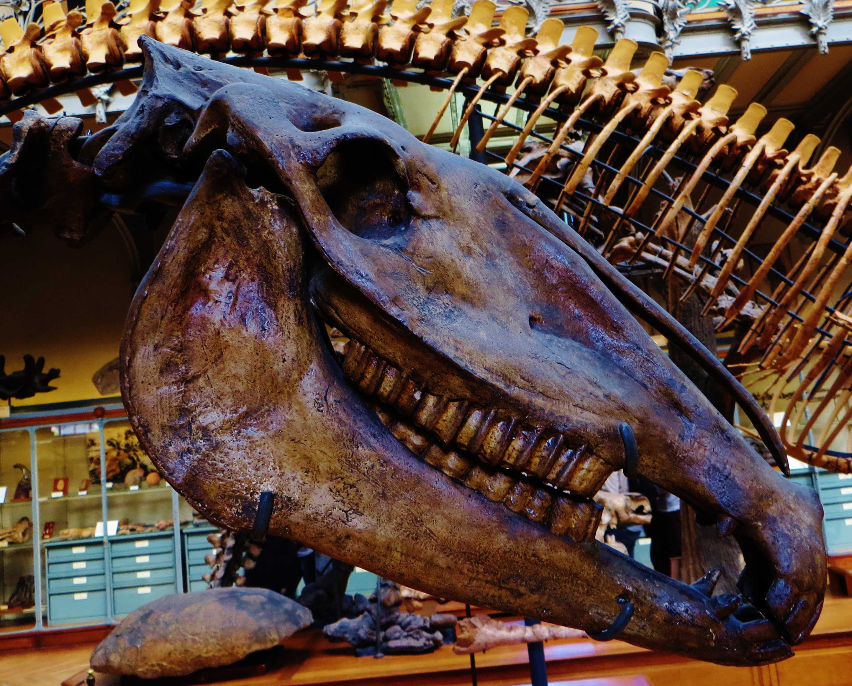 Fossil of Hipparion, an extinct mammal- Took the photo at Musee d'Histoire Naturelle, Paris